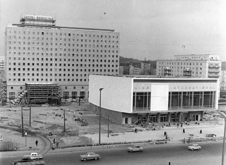 Zentralbild Brüggmann 29.10.1963 Kino "International" in der Berliner Karl-Marx-Allee Letzte Arbeiten werden jetzt am Kino "International" in der Karl-Marx-Allee im Berliner Stadtzentrum durchgeführt. Mitte November wird dieses moderne Lichtspieltheater seine ersten Besucher empfangen. UBz: Blick auf das Kino. Im Hintergrund das Hotel "Berolina", das ebenfalls bald fertiggestellt ist.